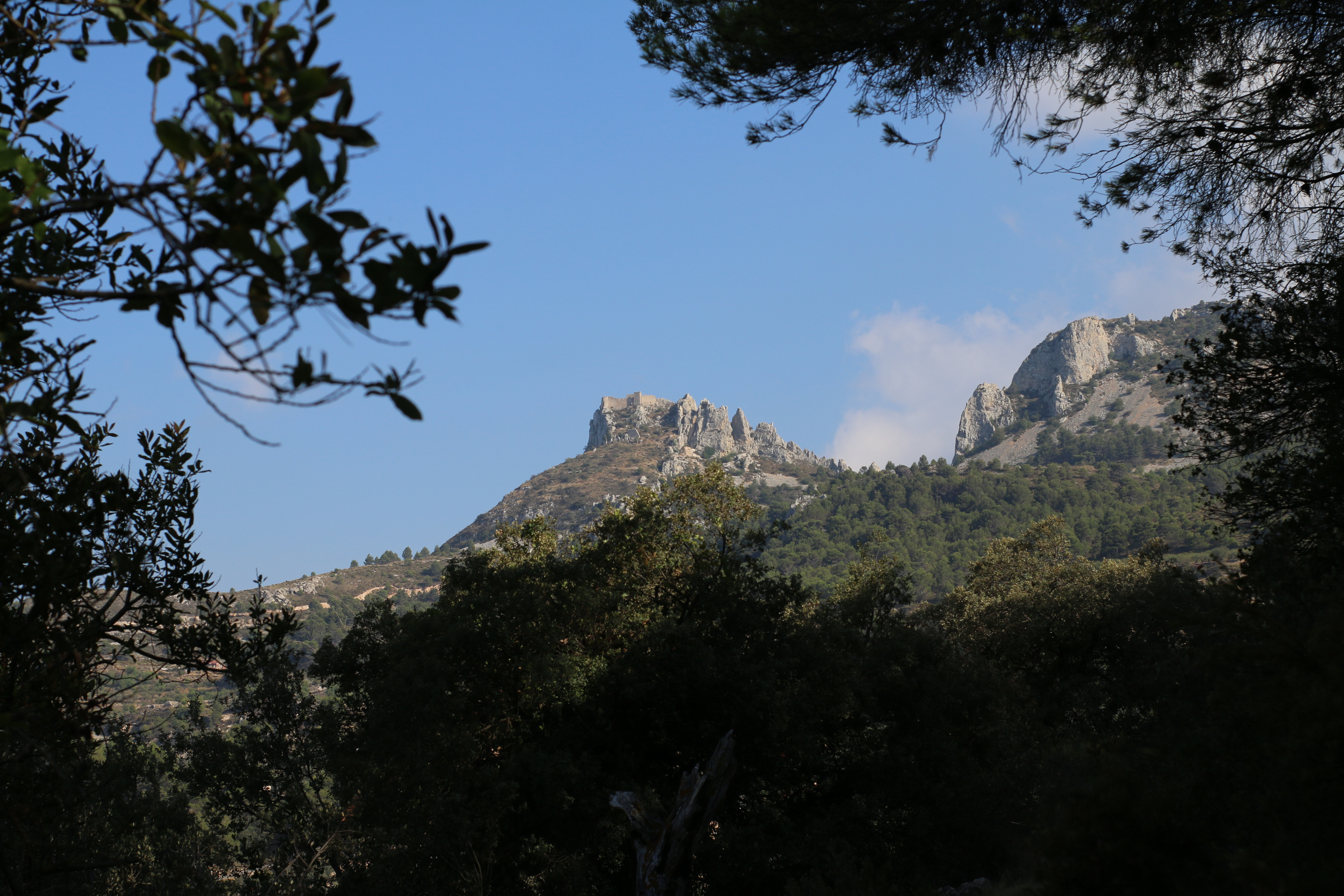 Vista del castillo de Alfofra desde Confrides